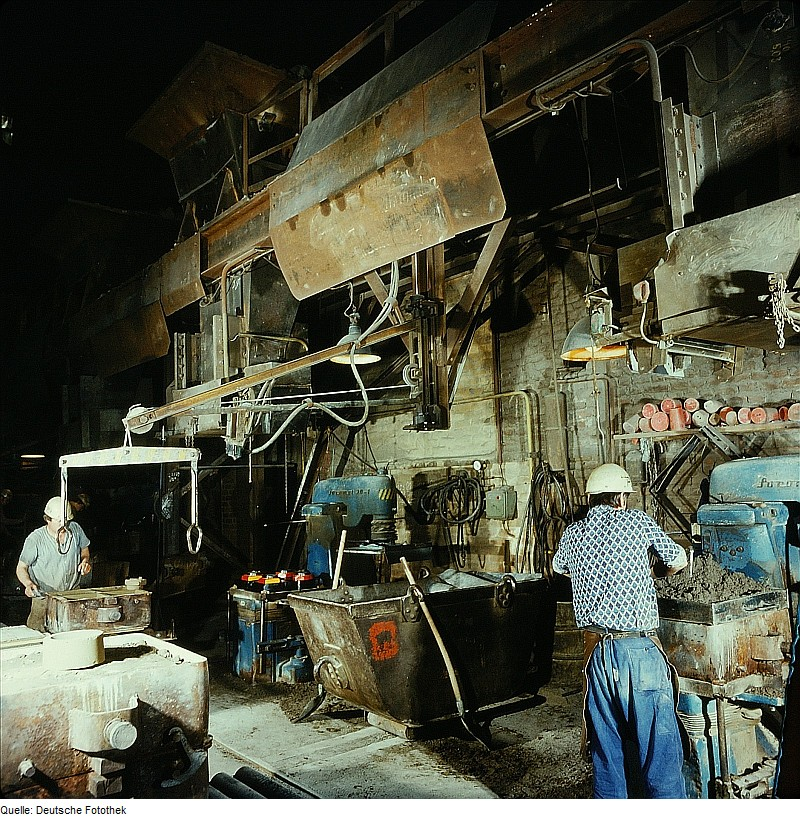 Original image description from the Deutsche Fotothek Facharbeiter für Gießereitechnik